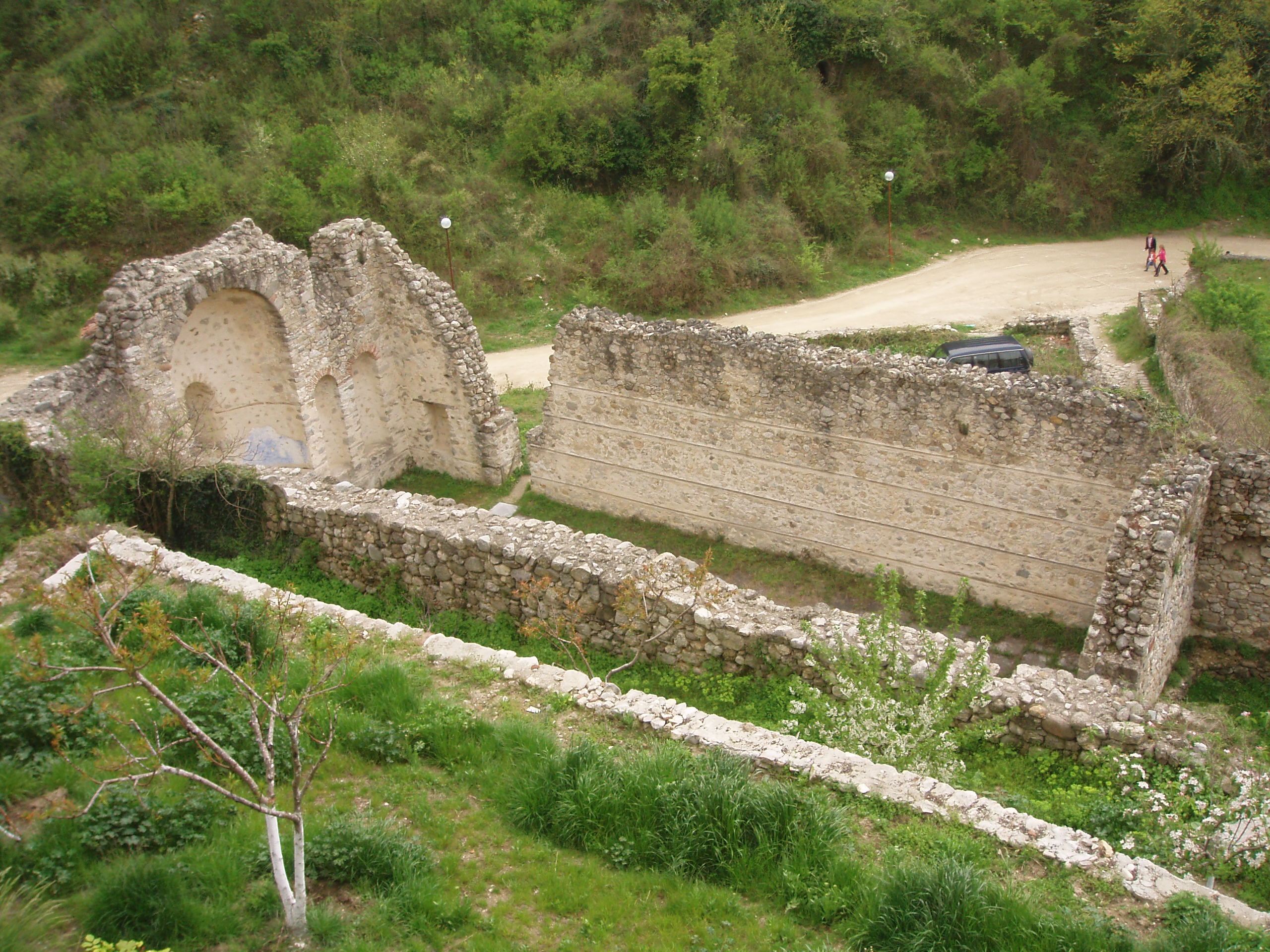 Melnik,Bulgaria